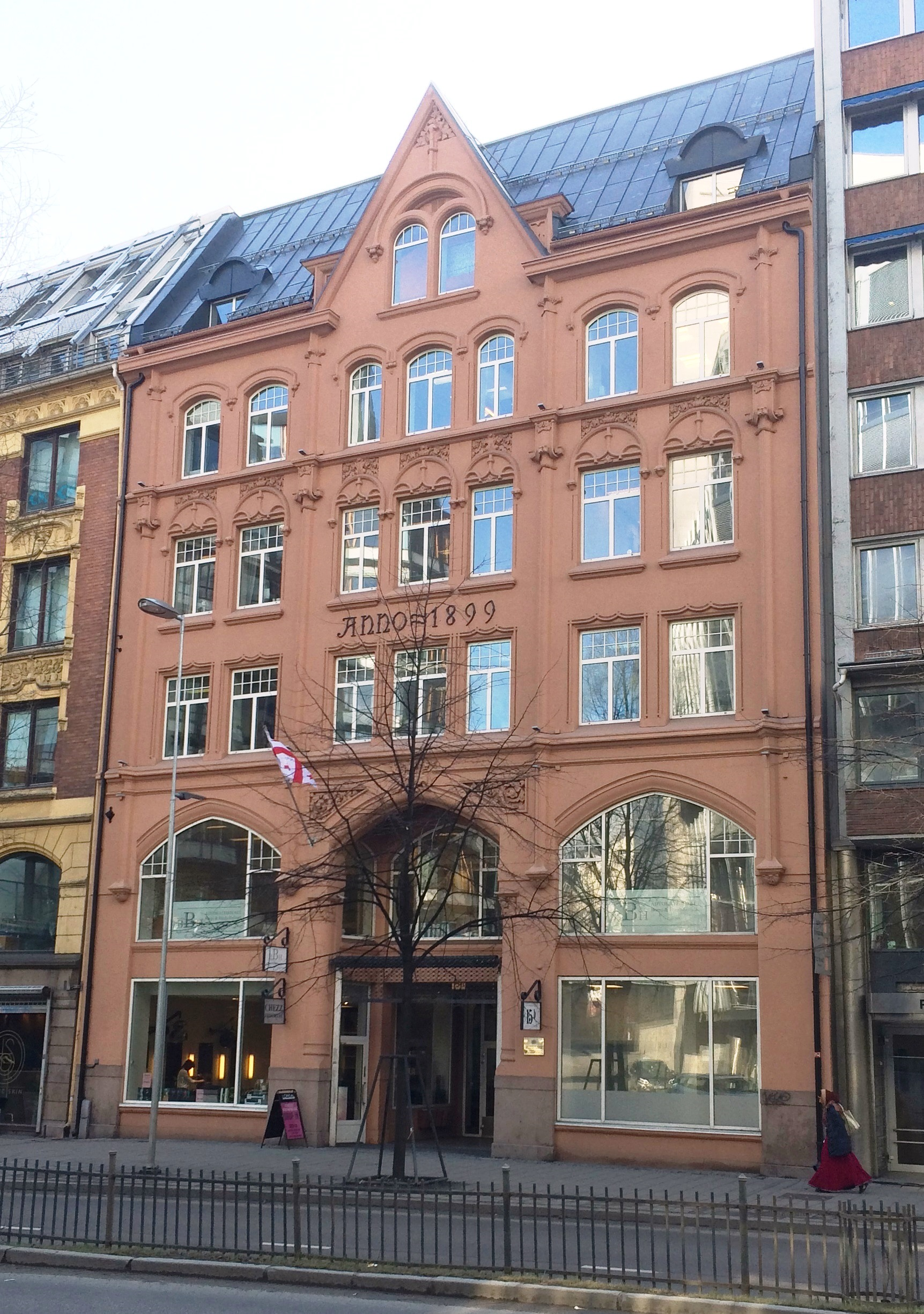 Pilestredet 15B med bl.a. Georgias ambassade